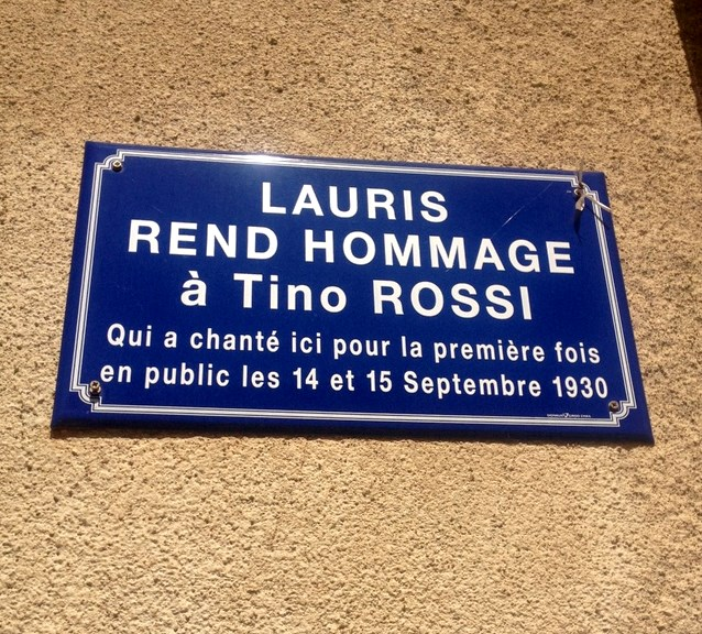 Lauris : plaque en hommage à Tino Rossi.